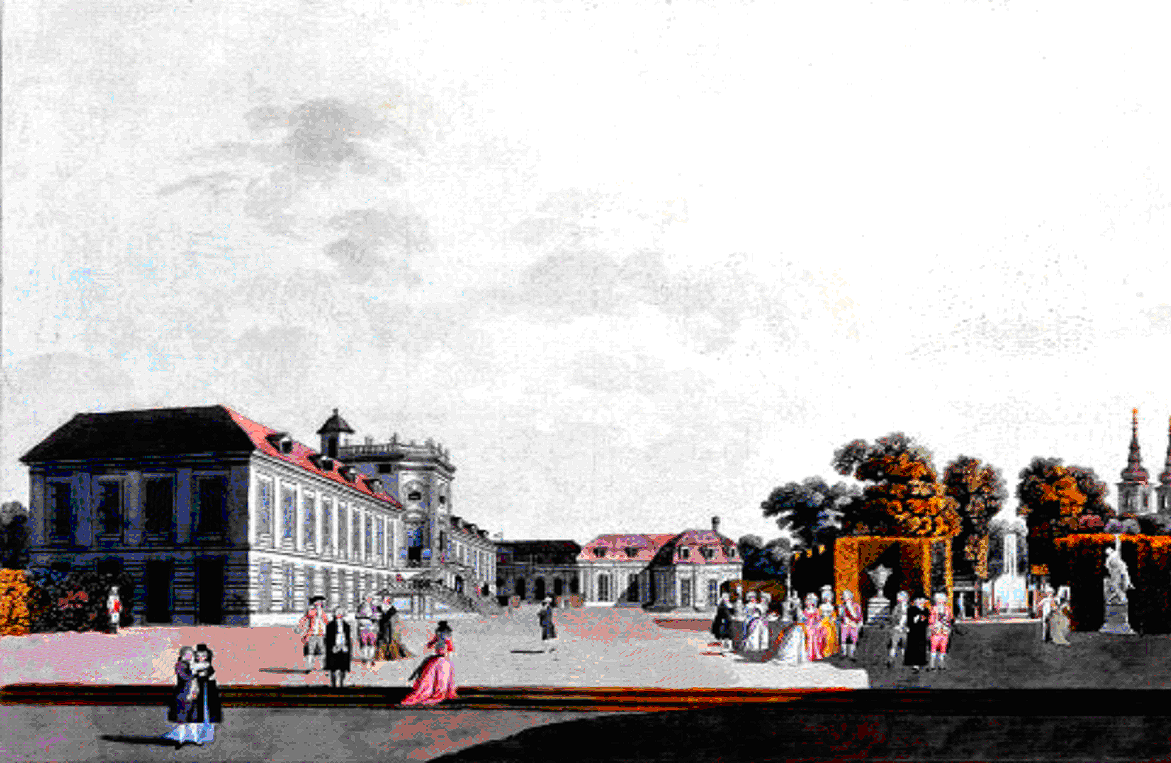 Sommerpalais der von Albrechtsburg im 18. Jh.